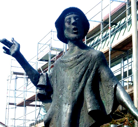 Beutelsbach, Weinstadt, Rems-Murr-Kreis Fritz Nuss: Skulptur Peter Gaiß („Gaispeter“) aus Beutelsbach, einer der Anführer des "Armen Konrad", aufständischer Bauern aus dem Remstal